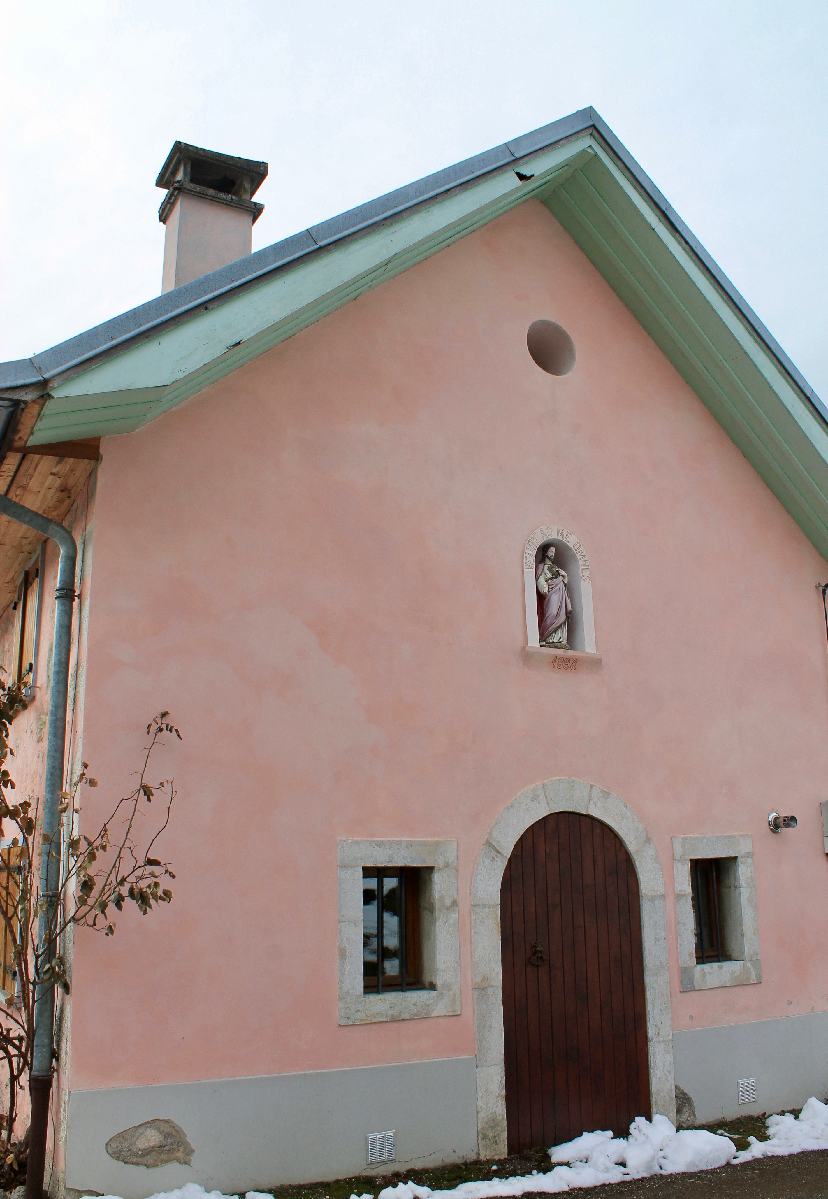 Chapelle des Saints-Guérin-Clair et François-de-Sales situé au Mont-Devant de Bellecombe-en-Bauges (Devenue habitation privée)